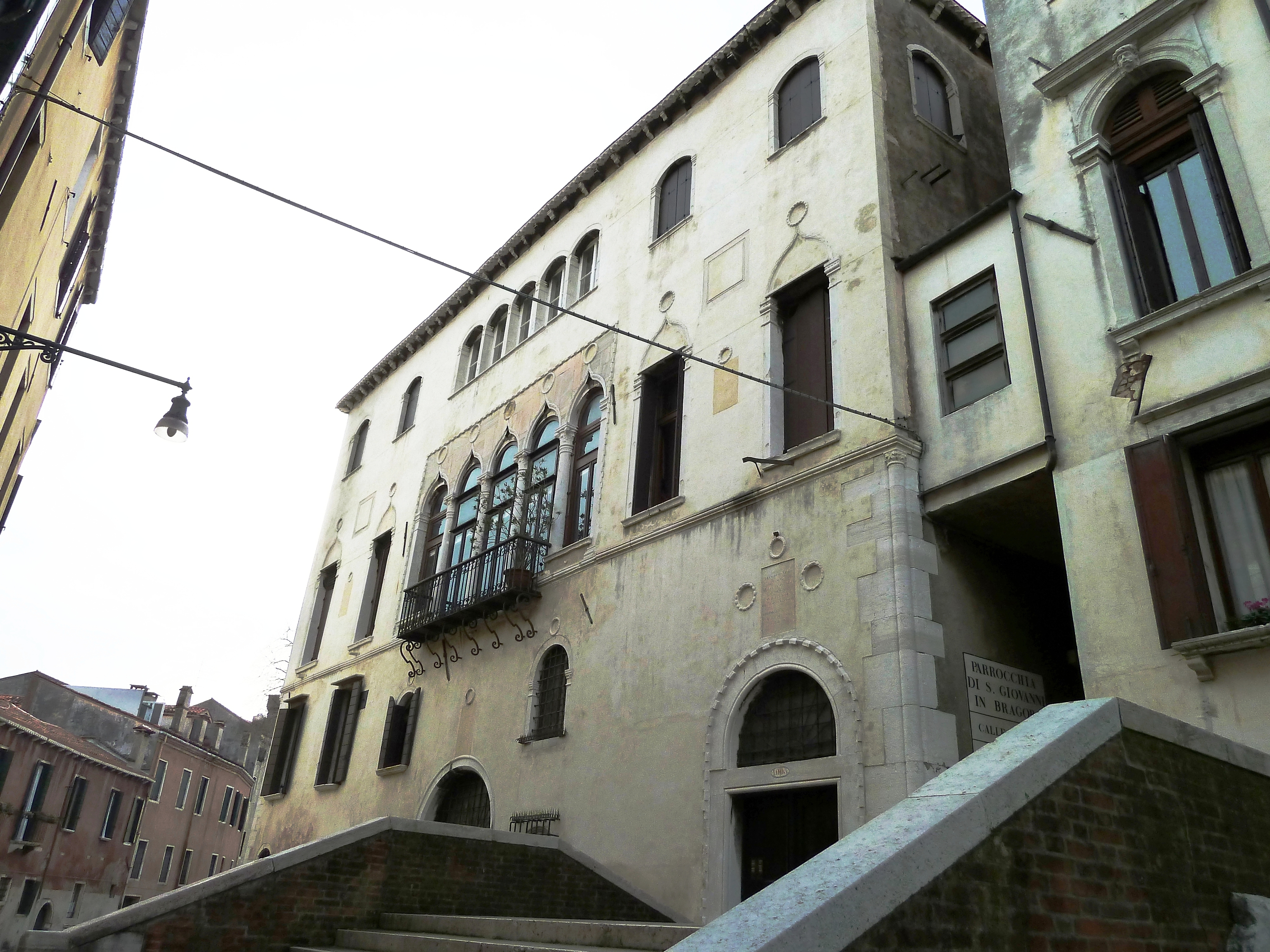 Palazzo Grandiben (Venice)